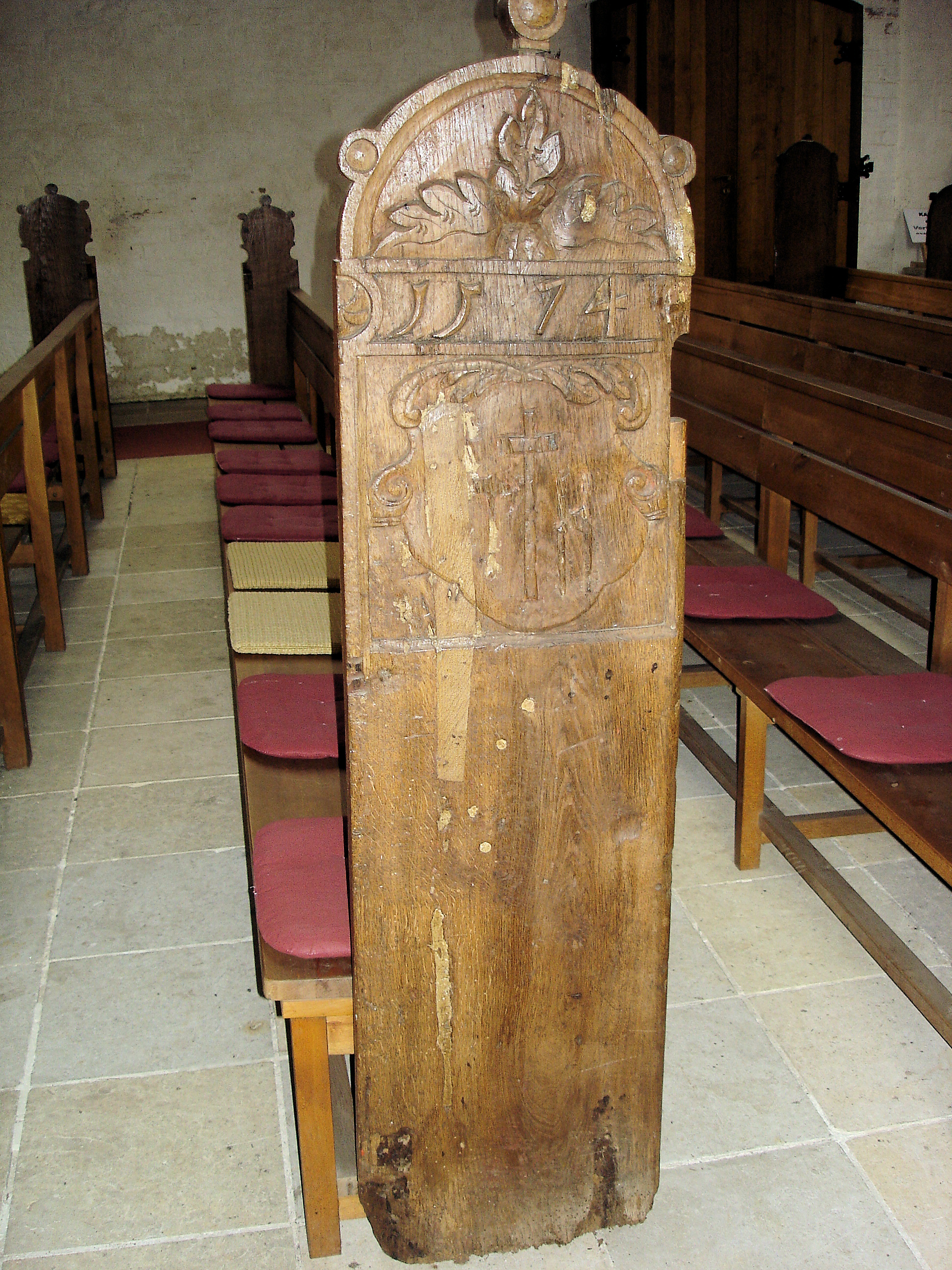 Wange einer Kirchenbank, Heiligen-Geist-Kirche Wismar, Mecklenburg-Vorpommern